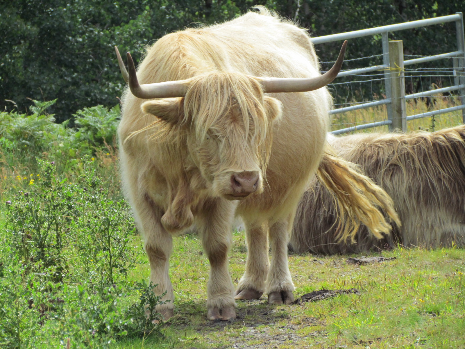 Eine Highlandkuh auf der Ilse of Skye (Schottland)